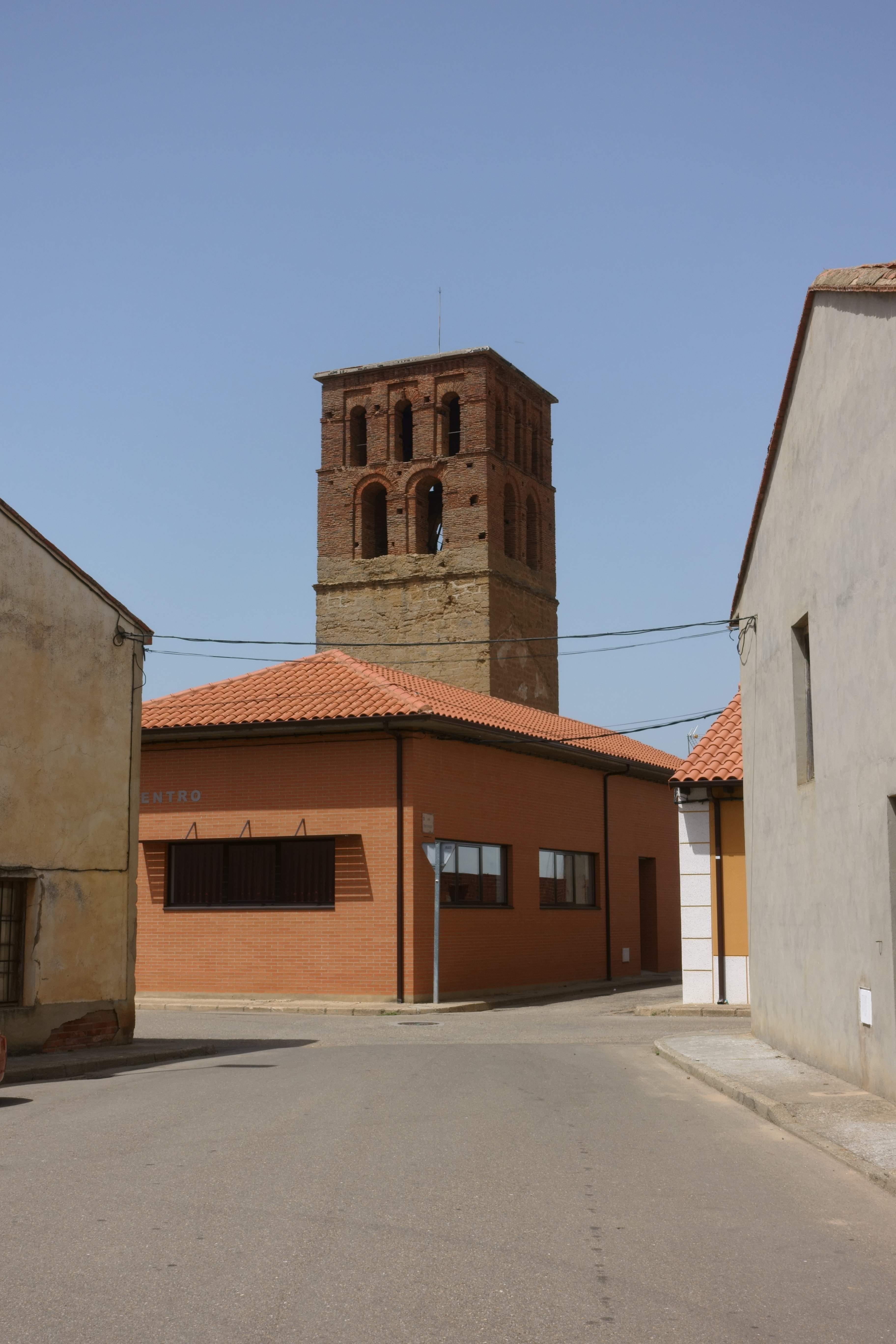 Torre de la antigua iglesia de San Juan, en Toral de los Guzmanes (León, España).